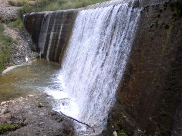 Salto de agua del río Santa María.